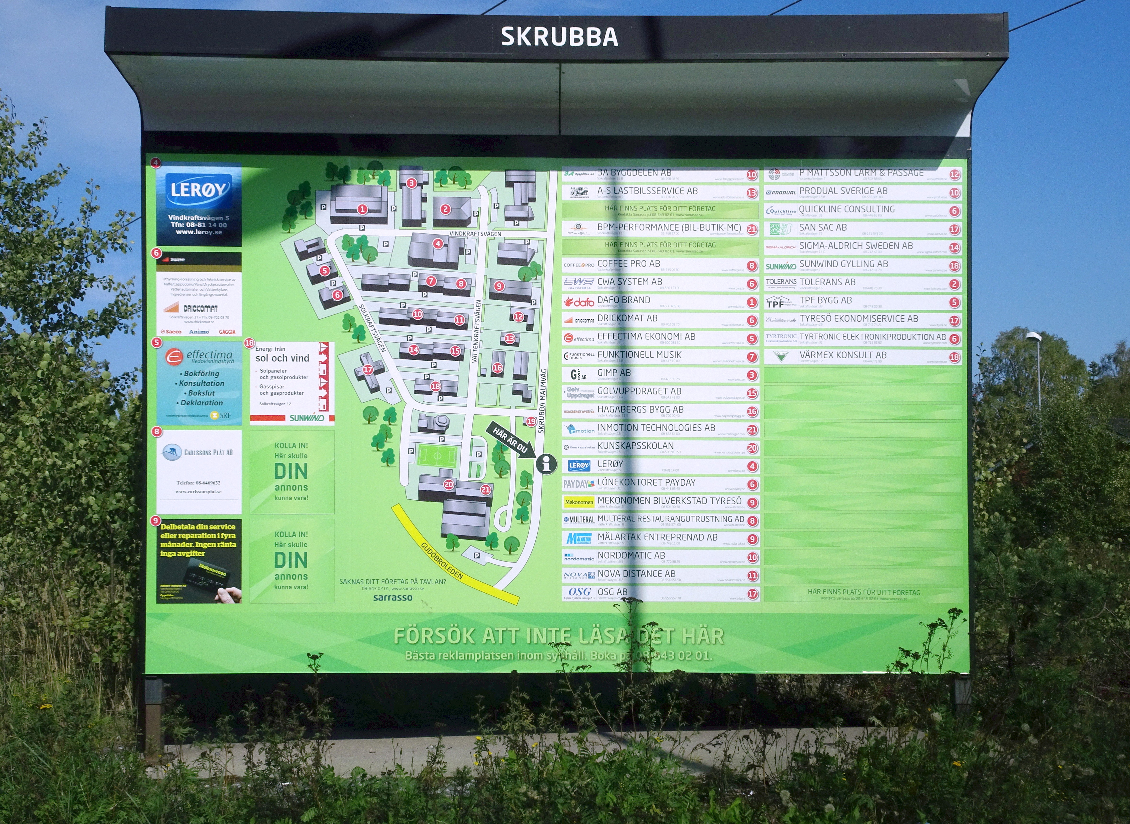 Skrubbatriangelns infotavla